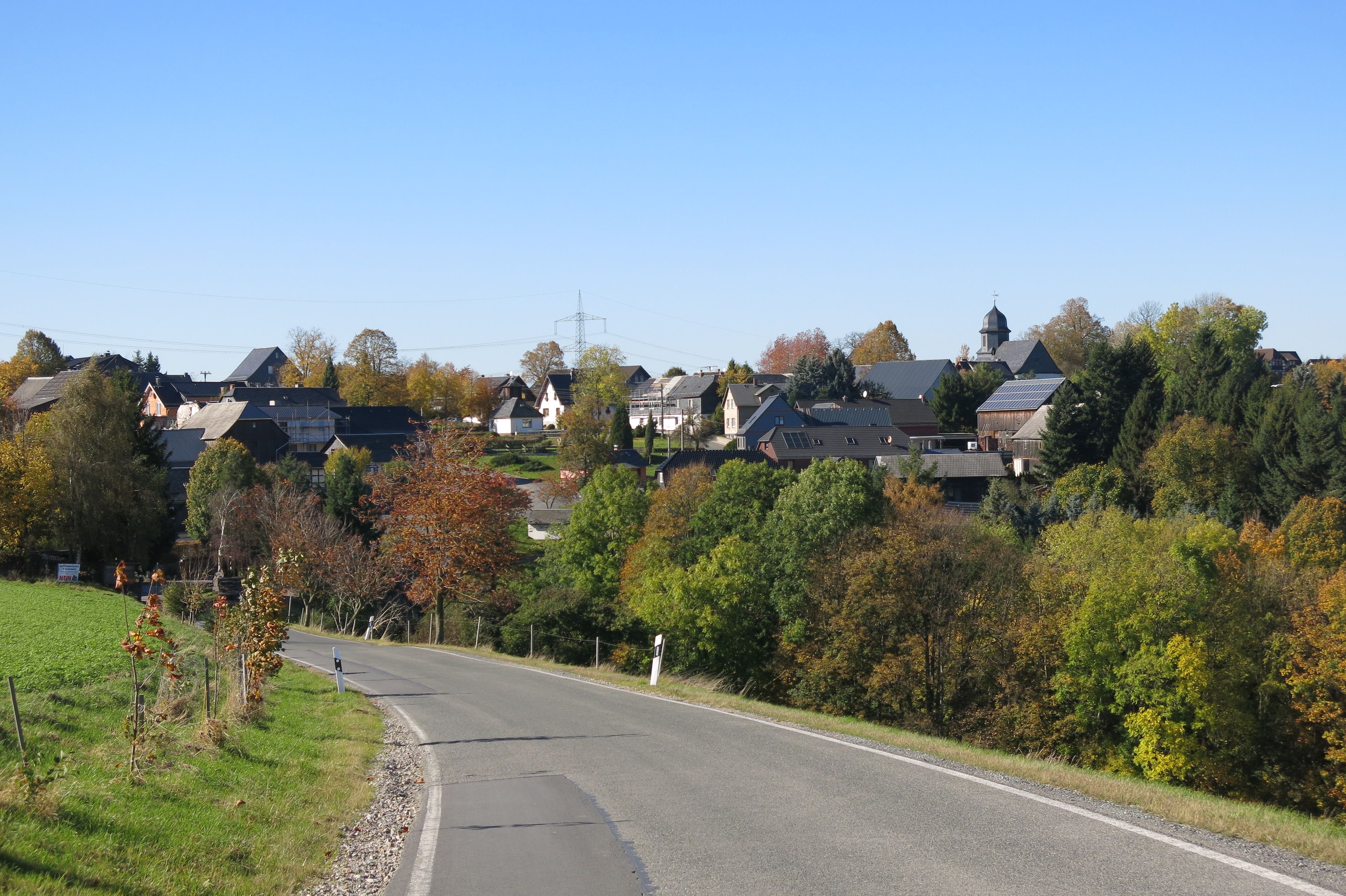 Blick auf das herbstliche Schweinbach